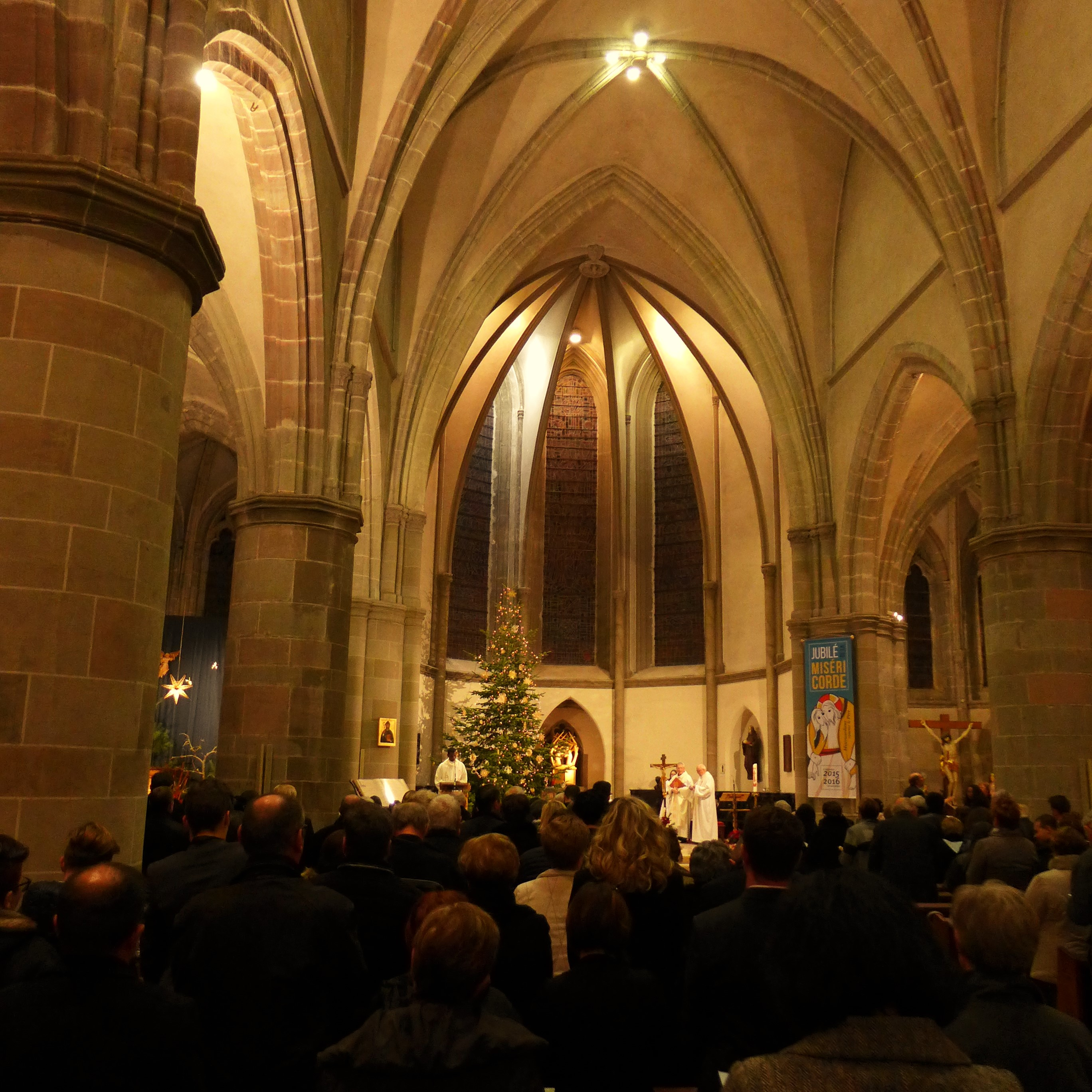 Ehemalige Abteikirche Hl. Kreuz, Bouzonville, Christmette 2015